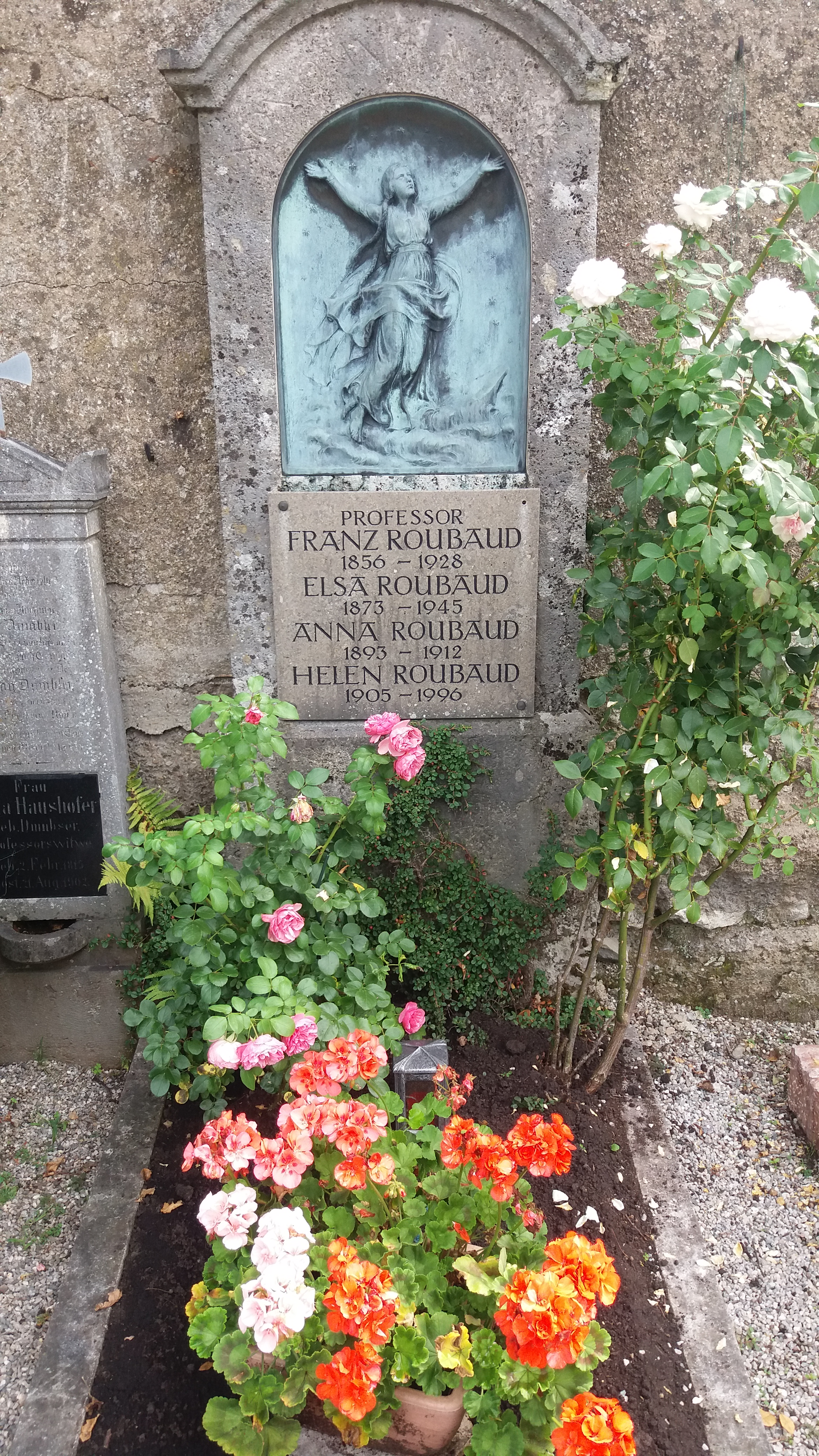 Grabstätte Franz Roubaud auf dem Inselfriedhof Frauenchiemsee